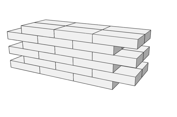 Sillares montados a soga.